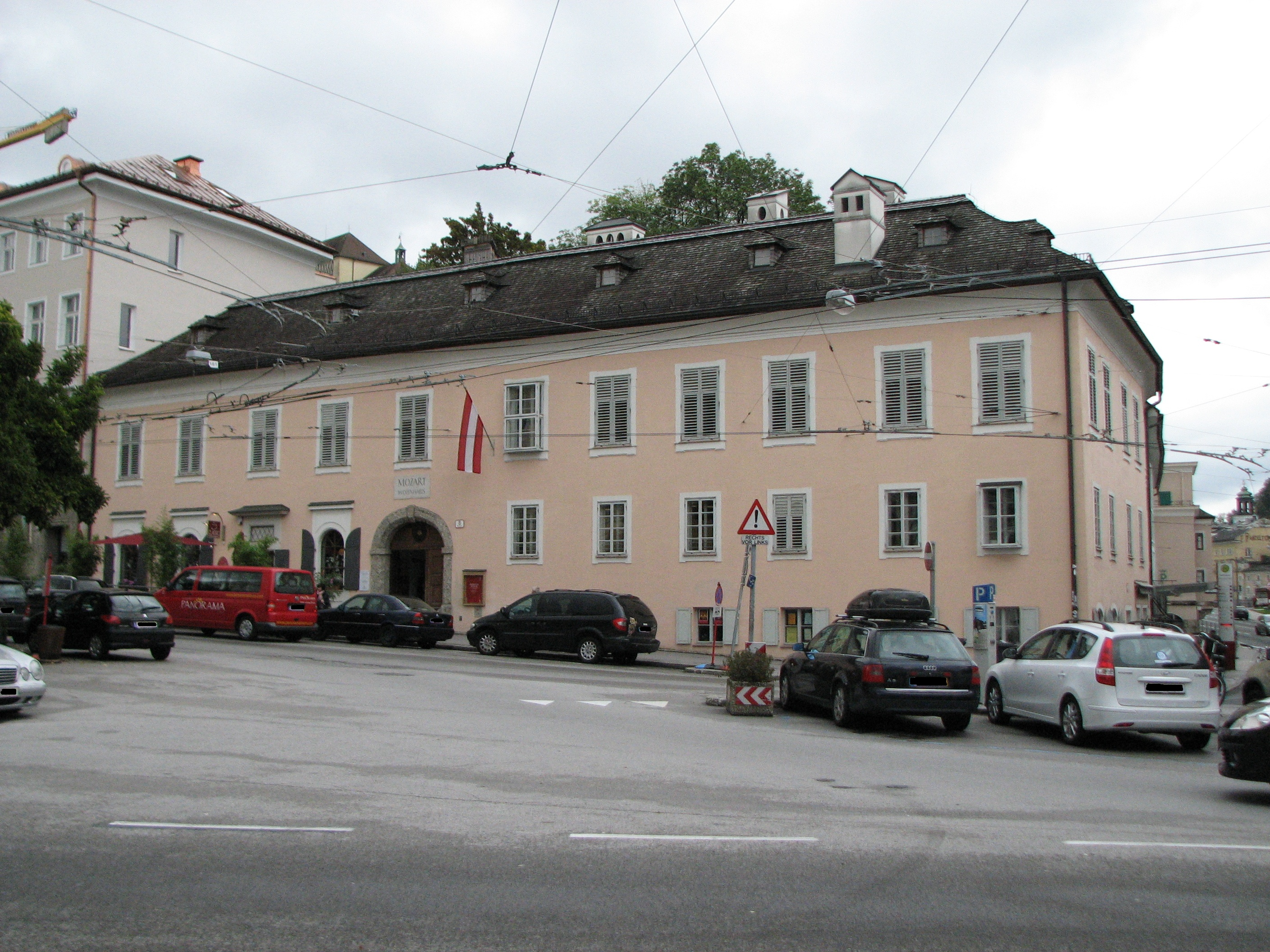 Bürgerhaus, Mozarts Wohnhaus, Makartplatz 8